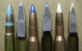 Proyectiles explosivos